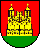 Герб поселка городского типа Брацлав (XVIII-XX вв.)